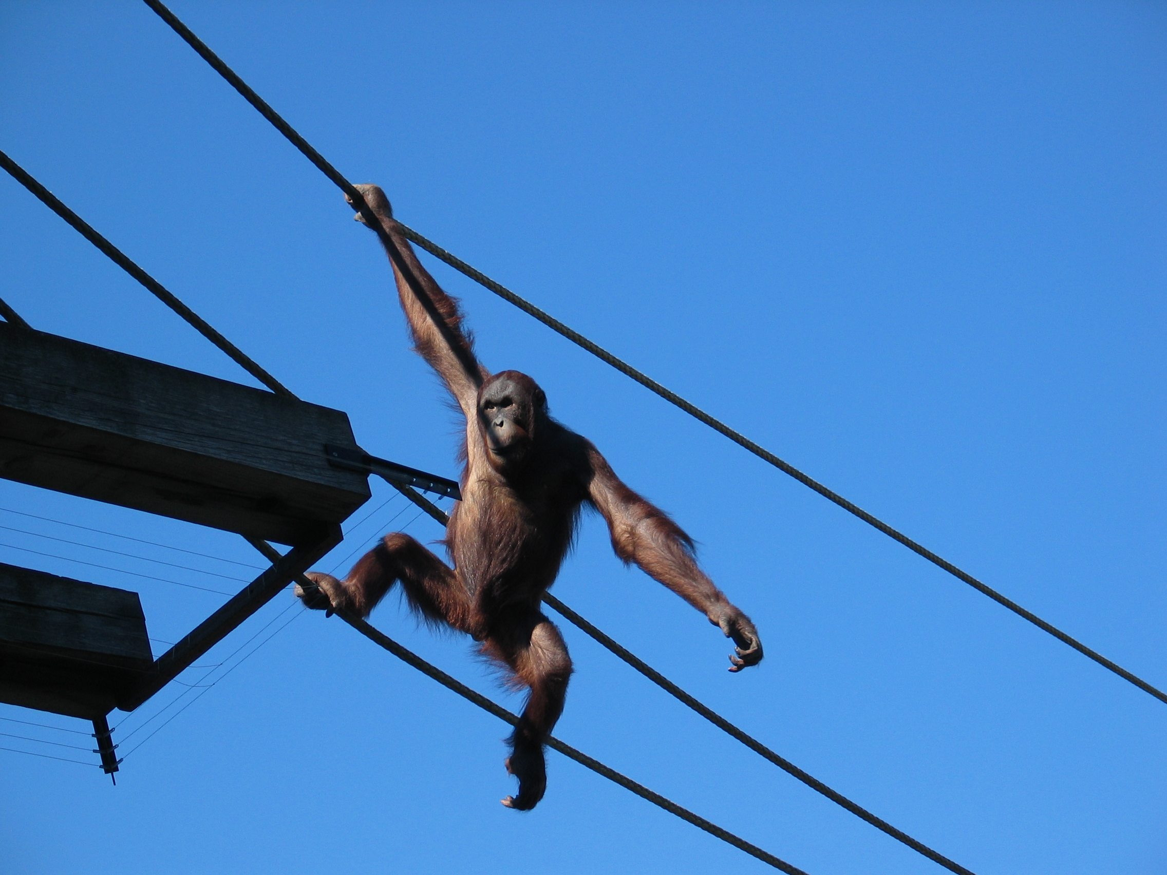 Orangutan in Ouwehands Dierenpark (netherlands)